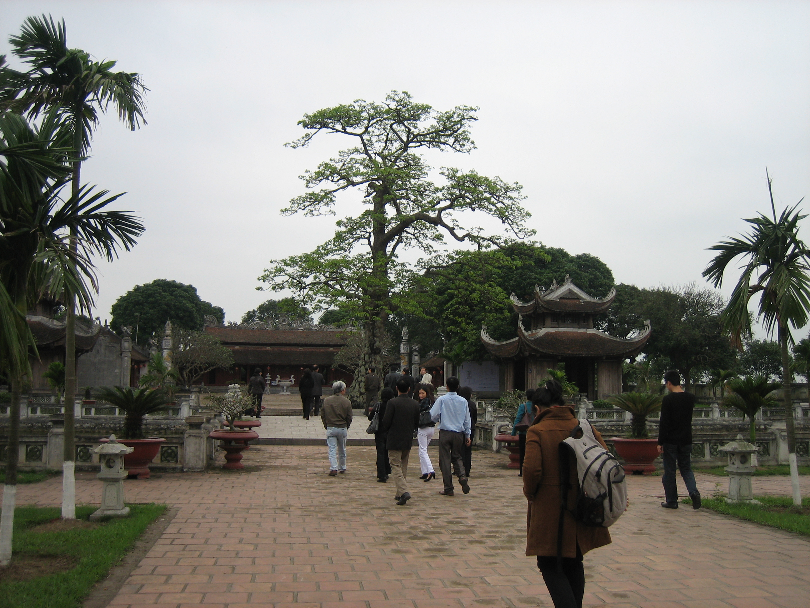 Toàn cảnh Văn Miếu Mao Điền, làng Mậu Tài, xã Cẩm Điền, huyện Cẩm Giàng, tỉnh Hải Dương